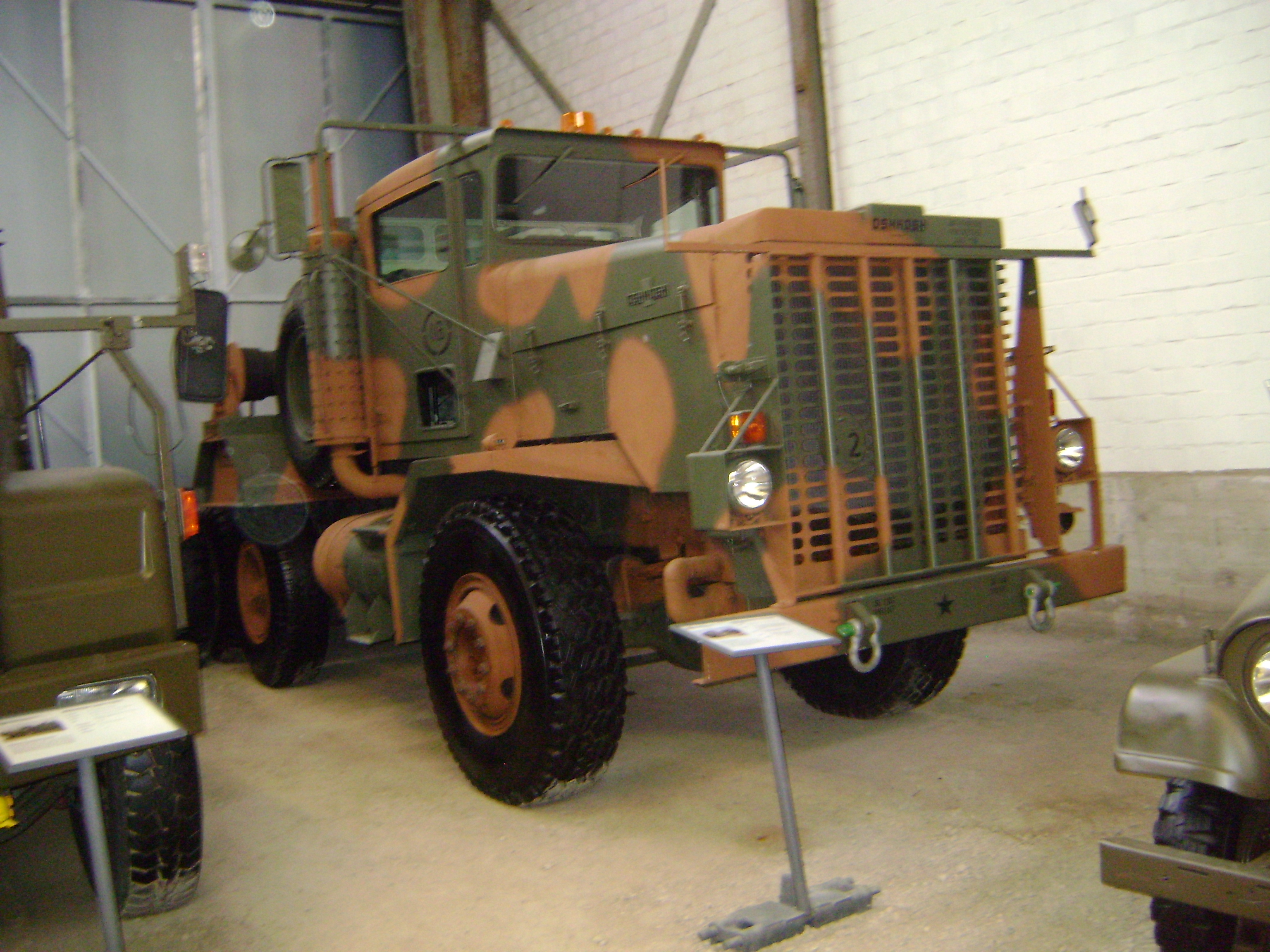 M911Oshkos